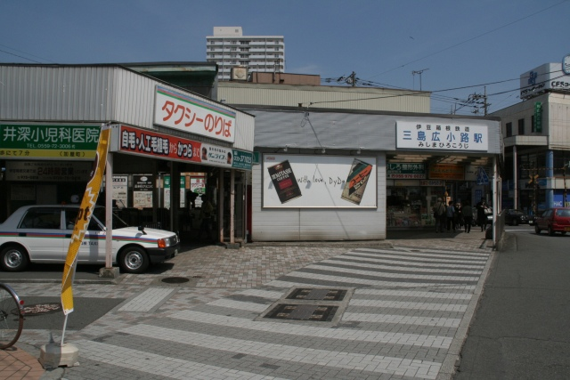 Mishima-Hirokōji Station, on the Izuhakone Sunzu Line, Mishima, Shizuoka